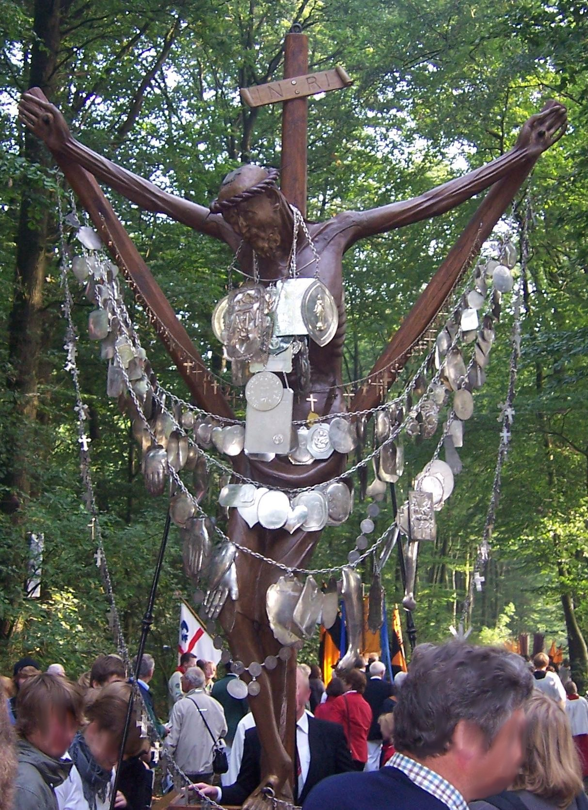 Coesfelder Kreuz mit silbernen Votivgaben